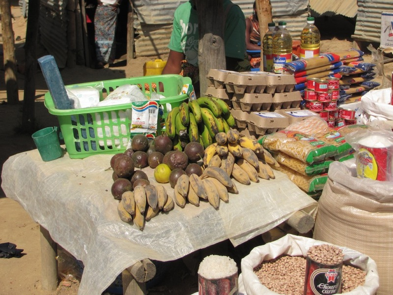 Market in Huambo, Angola